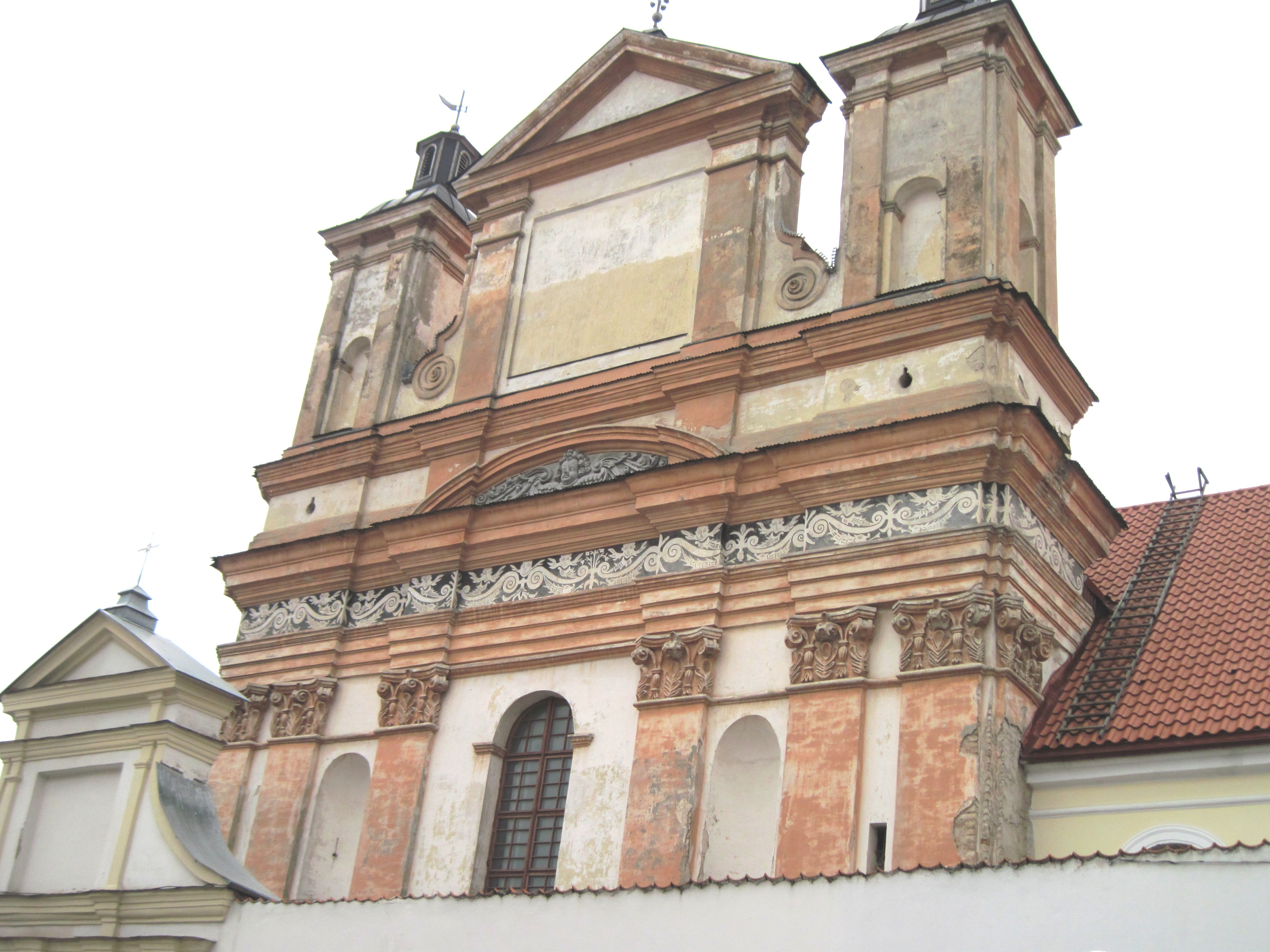 Галоўны фасад касцёла брыгітак у Гродна